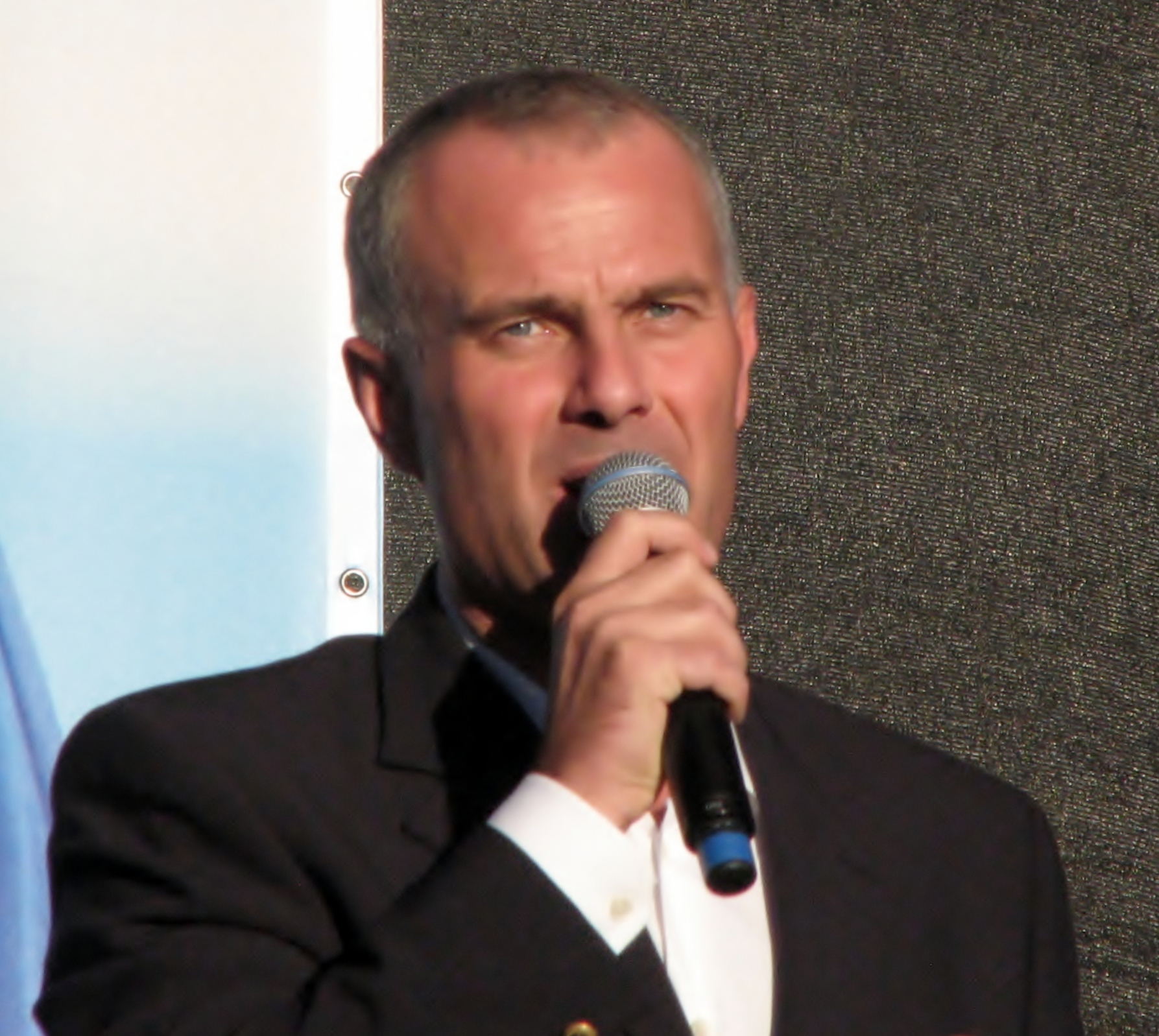 Mart Mardisalu Londoni olümpiamedalistide tervituspeol Vabaduse väljakul